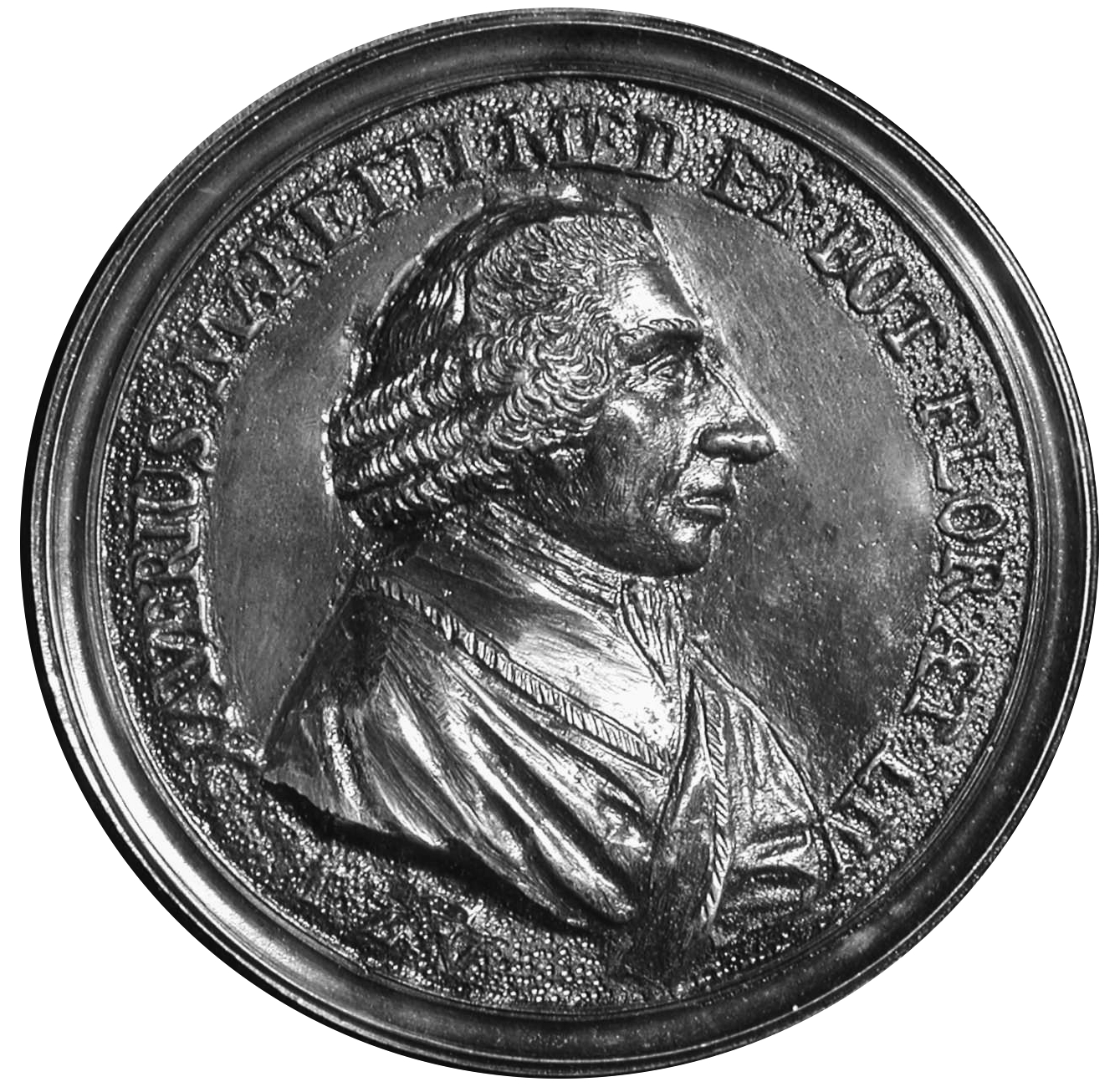 Italian medal commemorating Saverio Manetti made by Giovanni Zanobio Weber in 1777